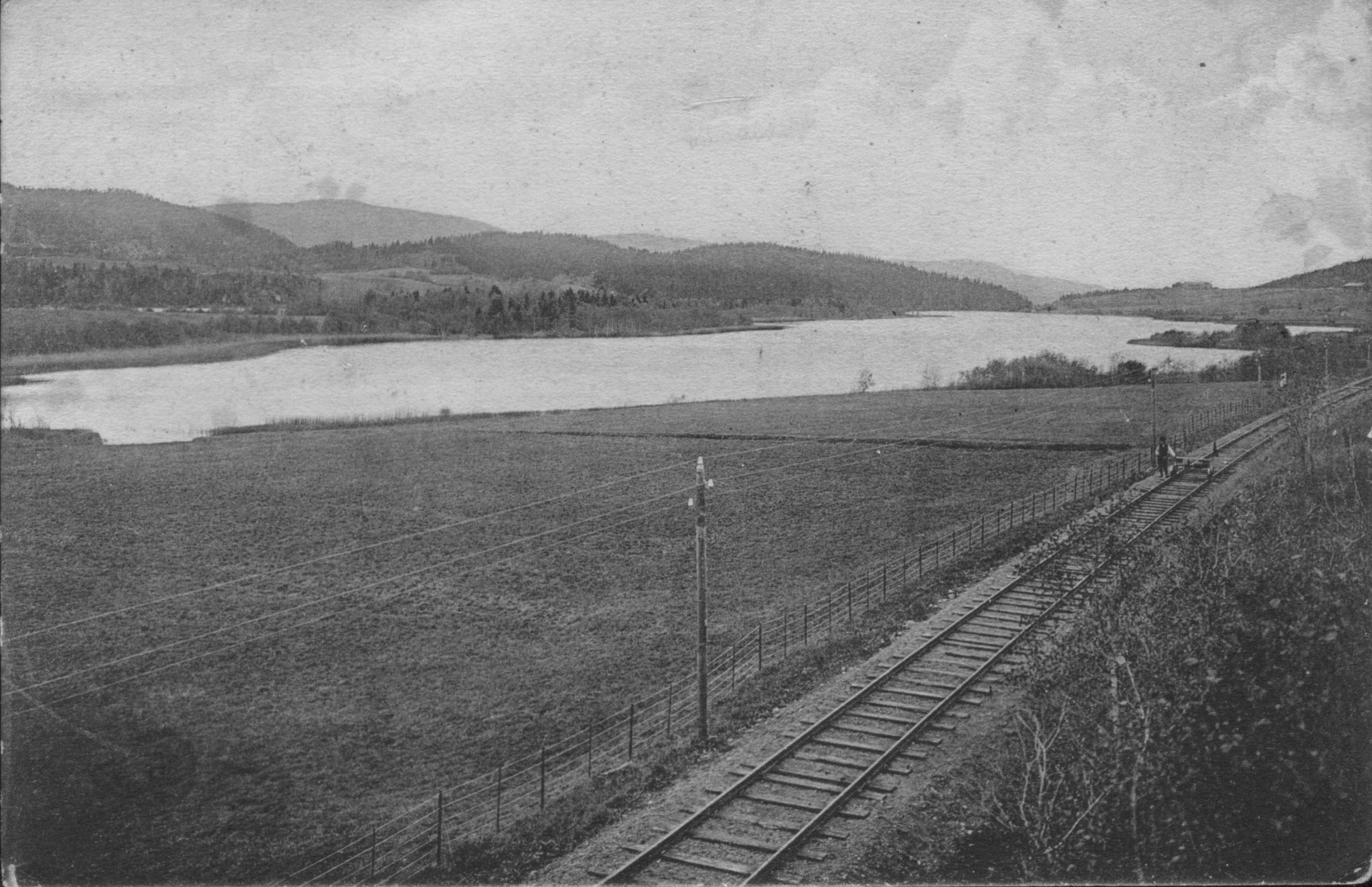 Nylagt jernbane ved Nesvatnet mellom Ronglan (Skogn) og Åsen. Jernbanestrekningen Hell-Levanger åpnet i 1902. Bildet (postkort) er tatt senest i 1906 og har påskrift "Hell-Sundebanen. Udsigt ved Næsvand". Fotograf / Photographer: Eneberettiget 1906. Fotograf Aune, Trondhjem Fotoeier / Photo owner: Karl Ove Lynum Digitalisering / Digitizing: Arne Langås Foto-ID / Photo ID: 028-0023 Hvis bildet gjengis i andre sammenhenger, oppgi Åsen Museum og Historielag, fotoeier og fotograf som kildereferanse. Har du utfyllende opplysninger? Legg gjerne igjen en kommentar nedenfor eller send e-post til . | If you re-use this photo, please refer to Åsen Museum og Historielag, the photographer and the owner of the photo. Do you have additional information? Please leave a comment or send an e-mail to .